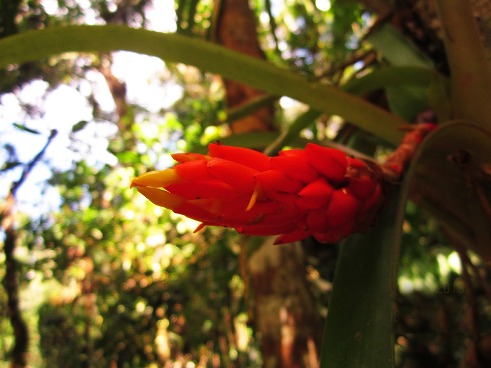 Orquídea en la catarata Salto del Cotomono